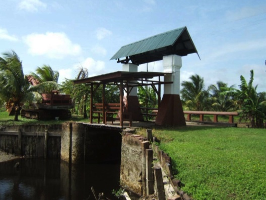 De loossluis van de plantage lijkt een copie van die van plantage Alkmaar aan de overzijde van de rivier. Deze plantage was ooit het eigendom van Charles Godeffroy, een broer van de eigenaar van Marienbosch. Misschien hebben de twee broers hun plantages gelijktijdig opgebouwd, en vaklieden uitgewisseld.